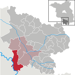 Mühlberg/Elbe in Brandenburg (Country) - District Elbe-Elster